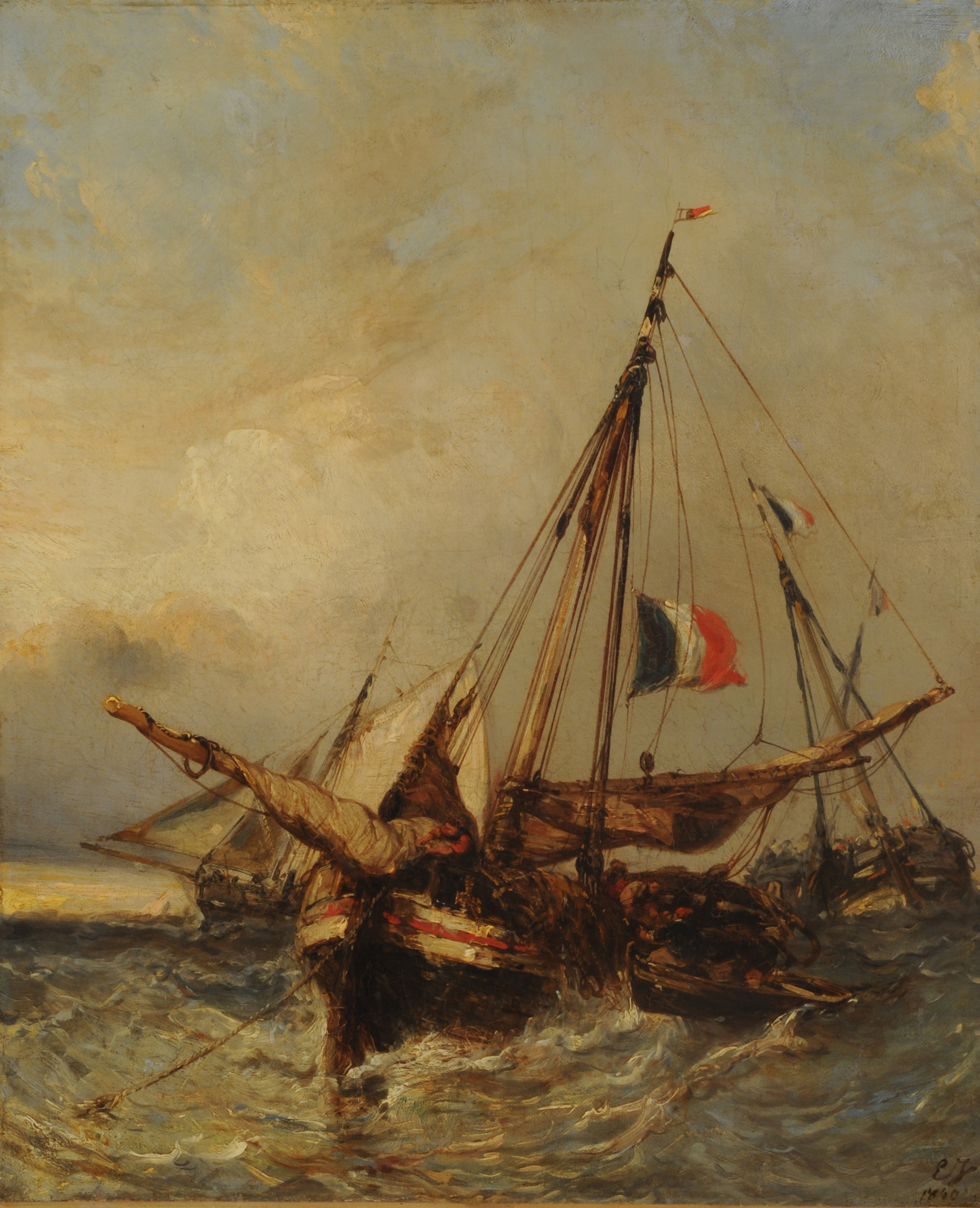 Marina.